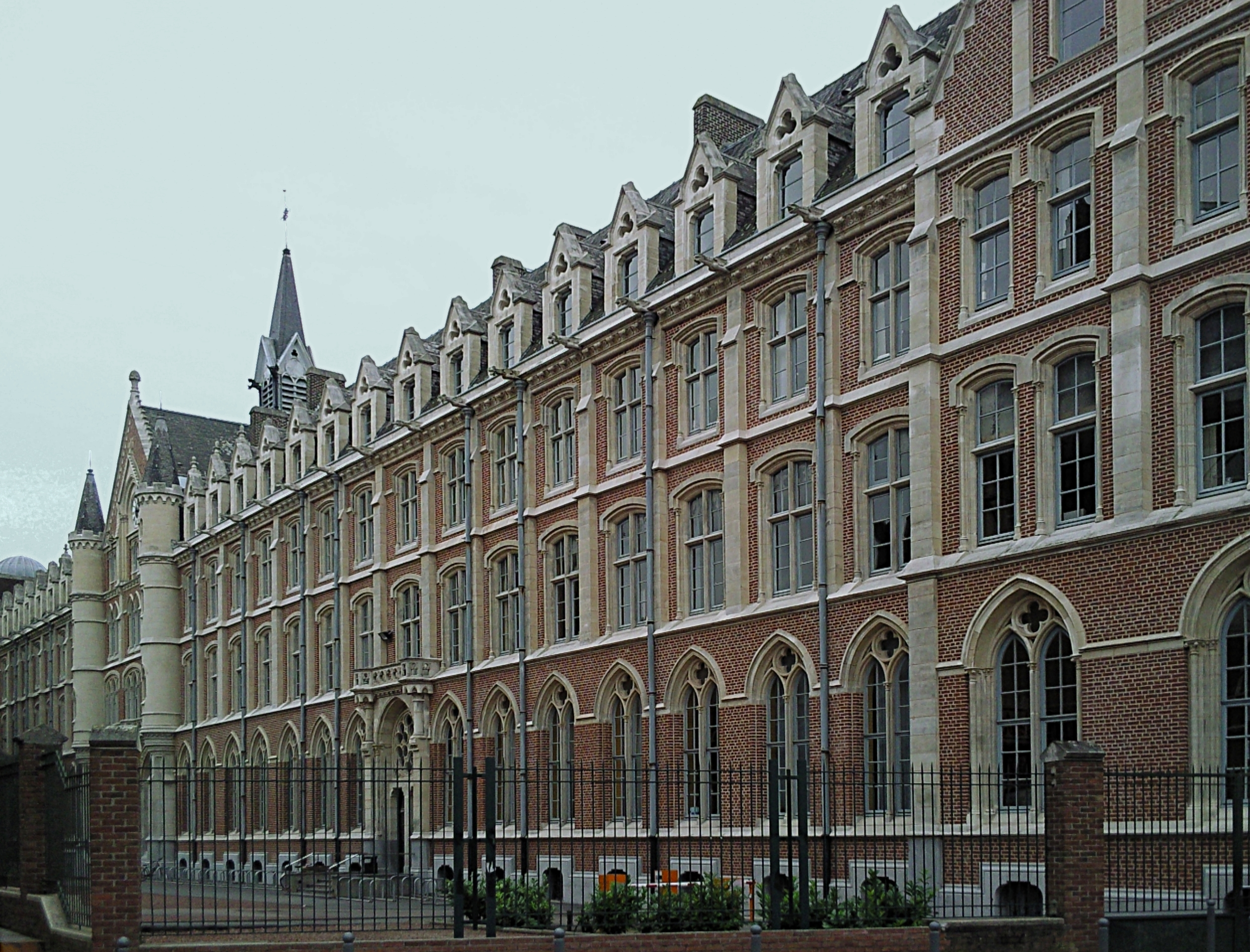 Vue de l'université catholique de Lille côté cour, dans le quartier Vauban.